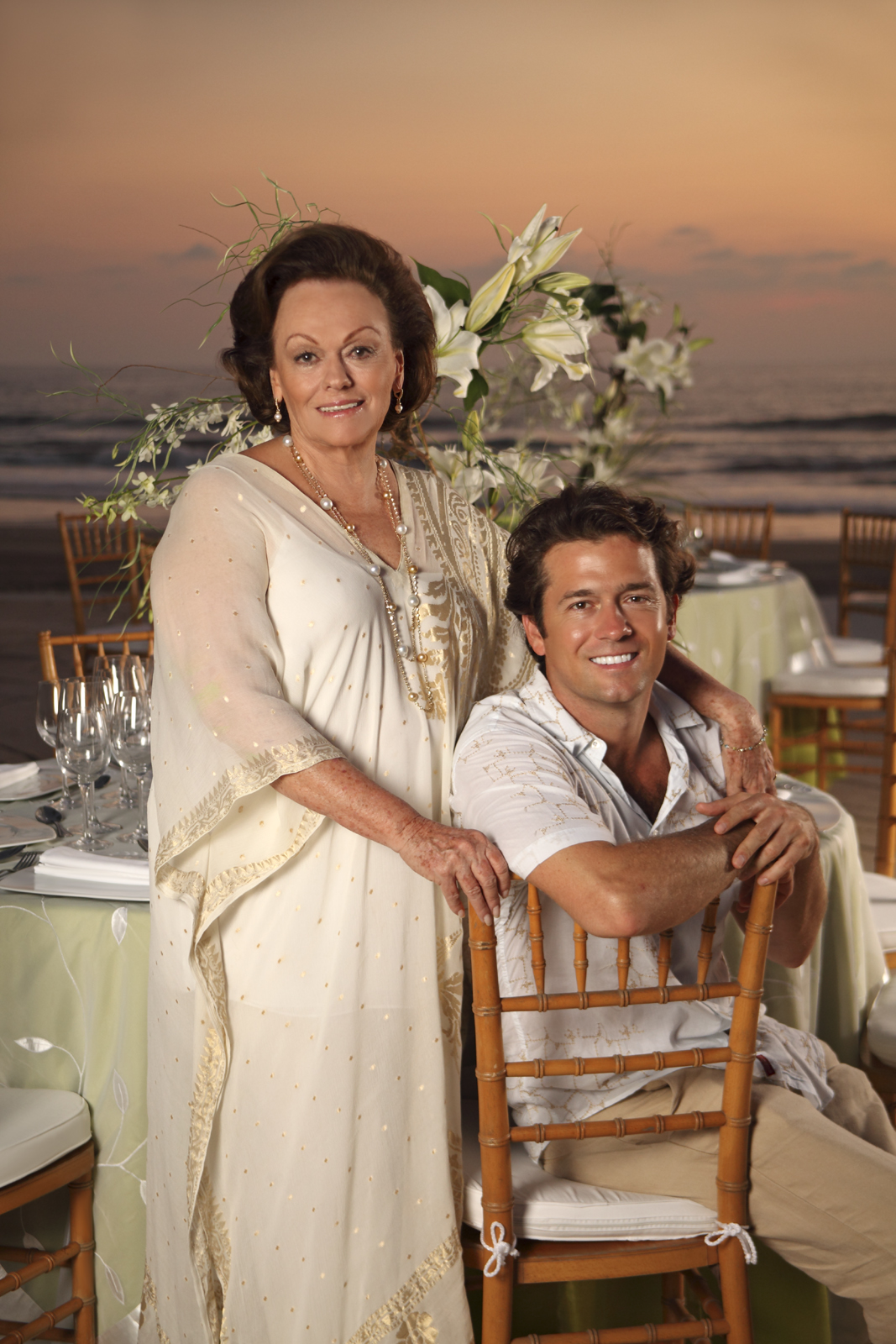 Foto de Banquetes